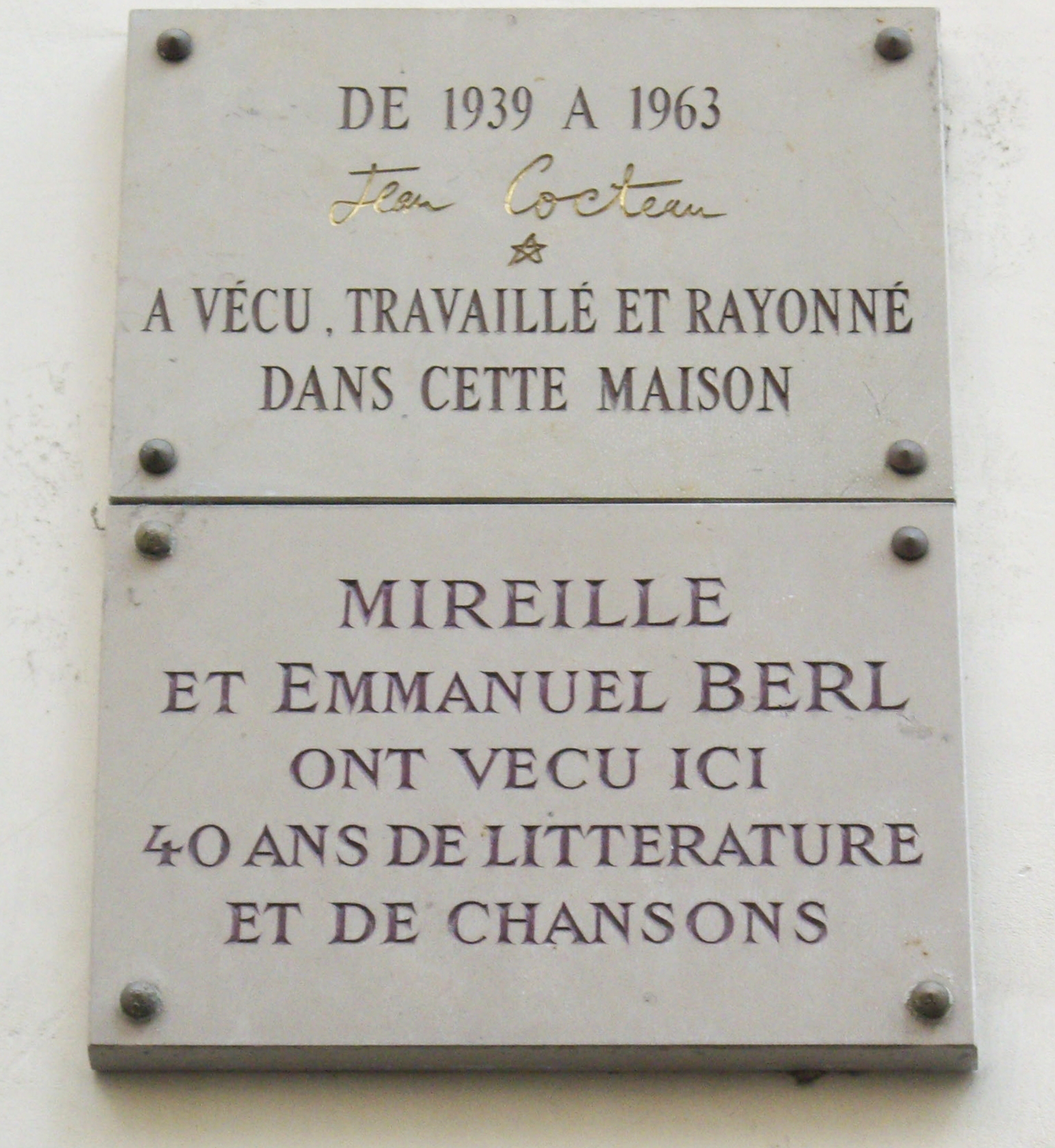 Plaques apposées au n° 36 de la rue de Montpensier, Paris 1er, où vécut Jean Cocteau (1889-1963), de 1939 à 1963, ainsi qu'Emmanuel Berl (1892-1976) et son épouse Mireille Hartuch, dite Mireille (1906-1996), pendant 40 ans.